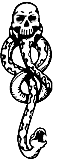 Tatouage des mangemorts